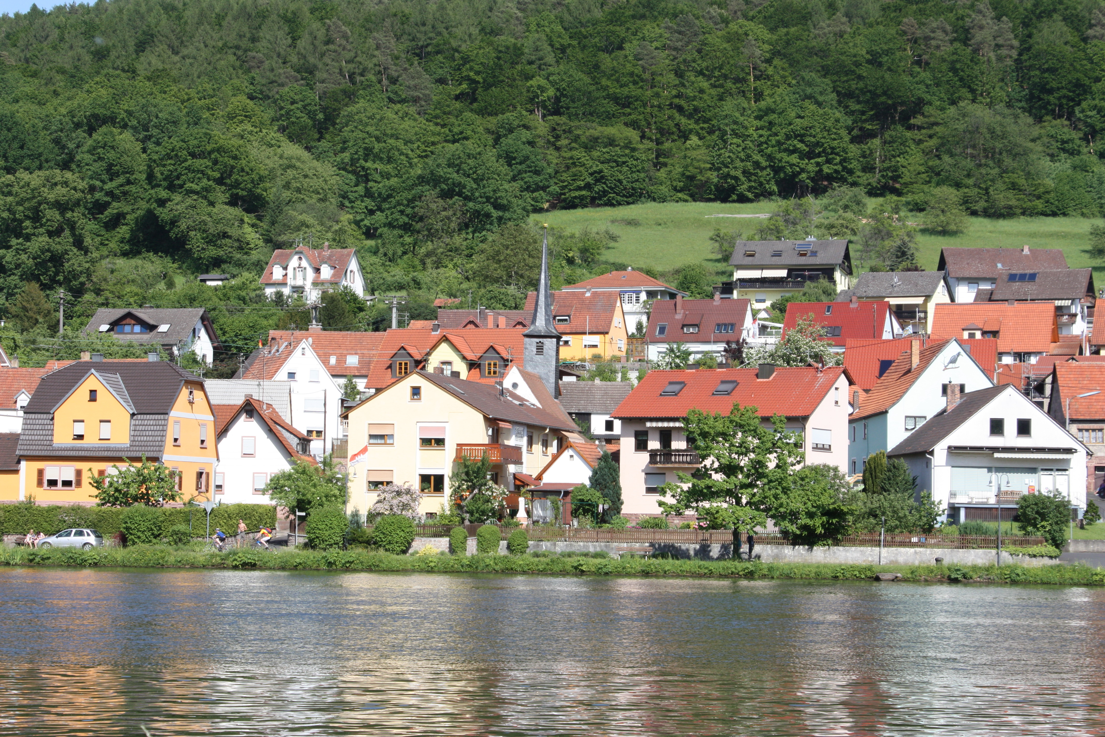 Neustadt am Main OT Erlach